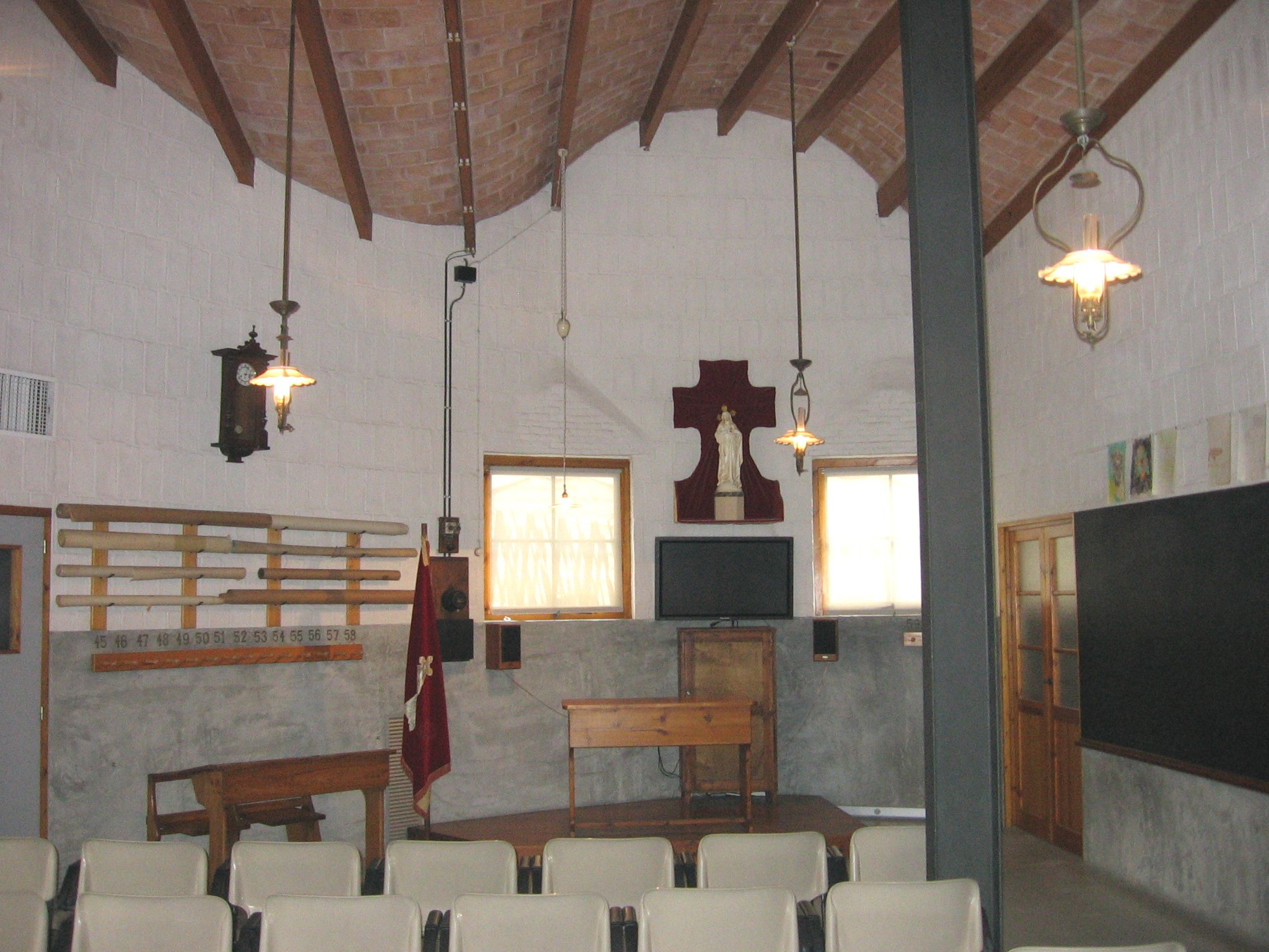 Interior de las Escuelas de la Sagrada Familia.